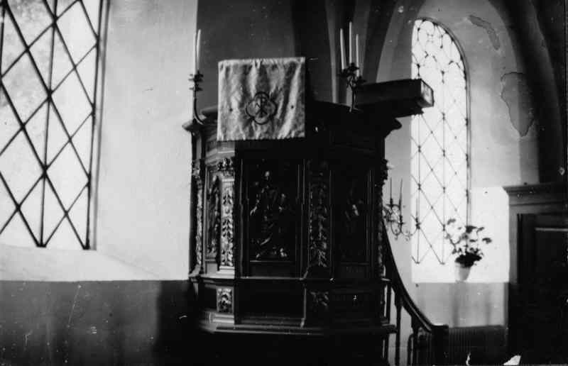 Predikstol. Kategori: (02) PredikstolarPredikstol.